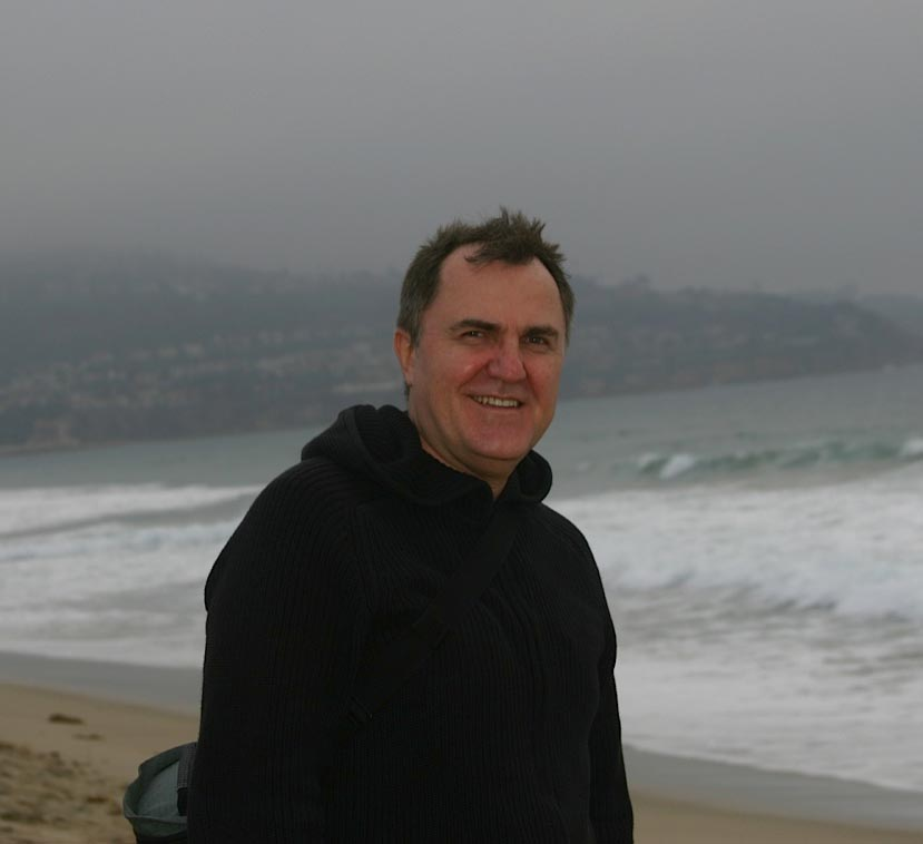 Беларуская (тарашкевіца): Сяргей Кушняроў — сцэнарыст, рэжысэр і мастак